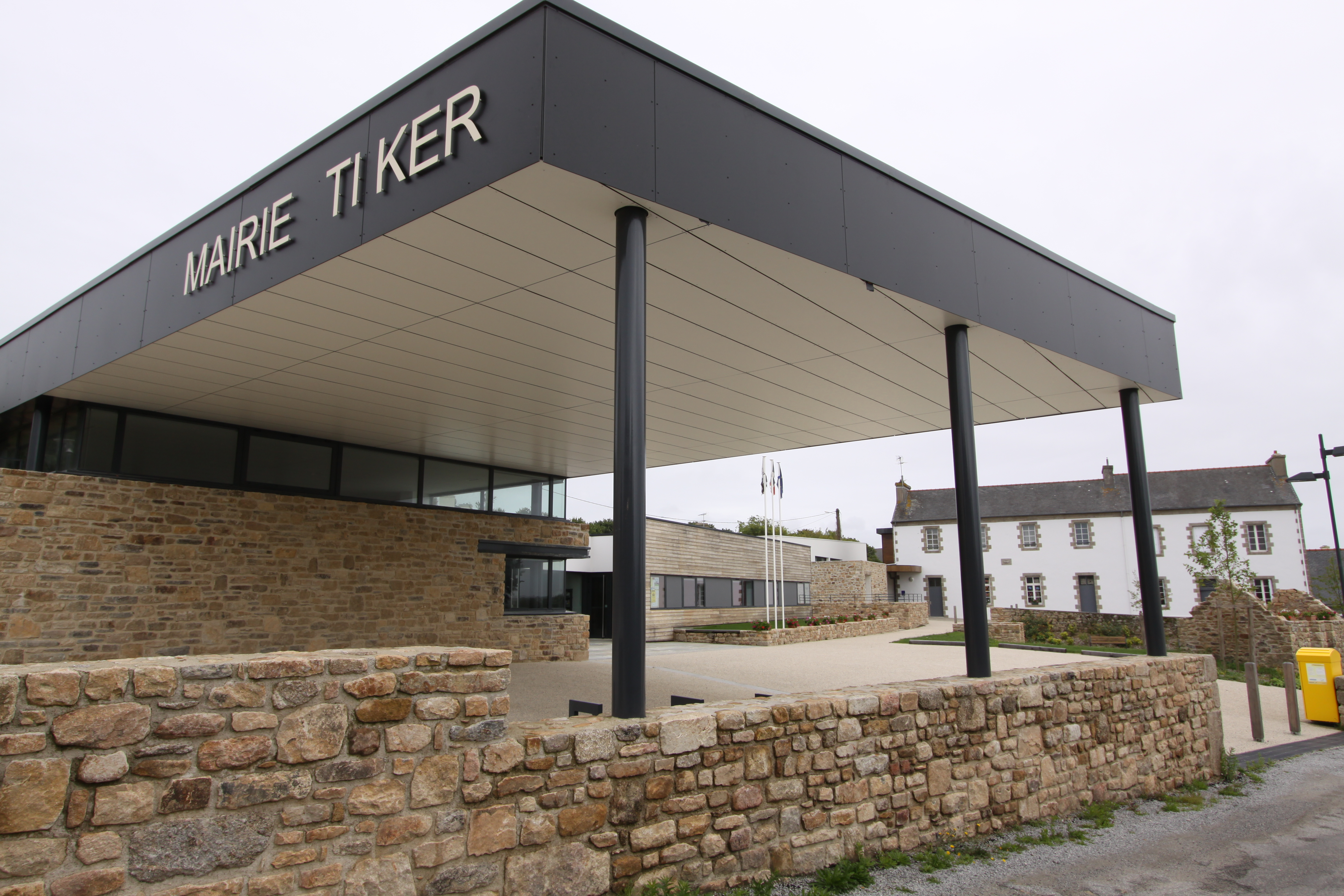 Mairie de la commune de Brélès